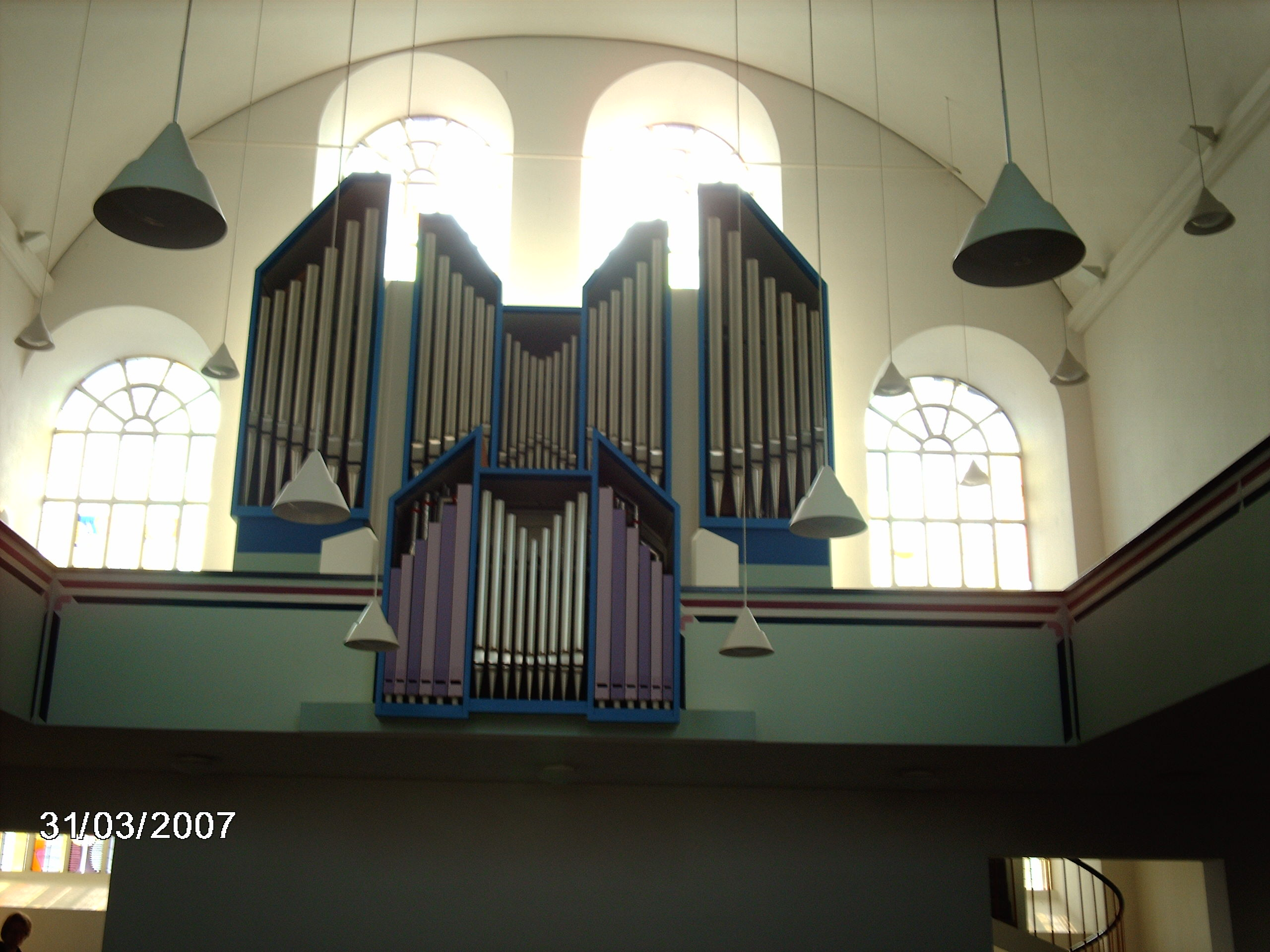 Orgel der evangelischen Kirche Goch